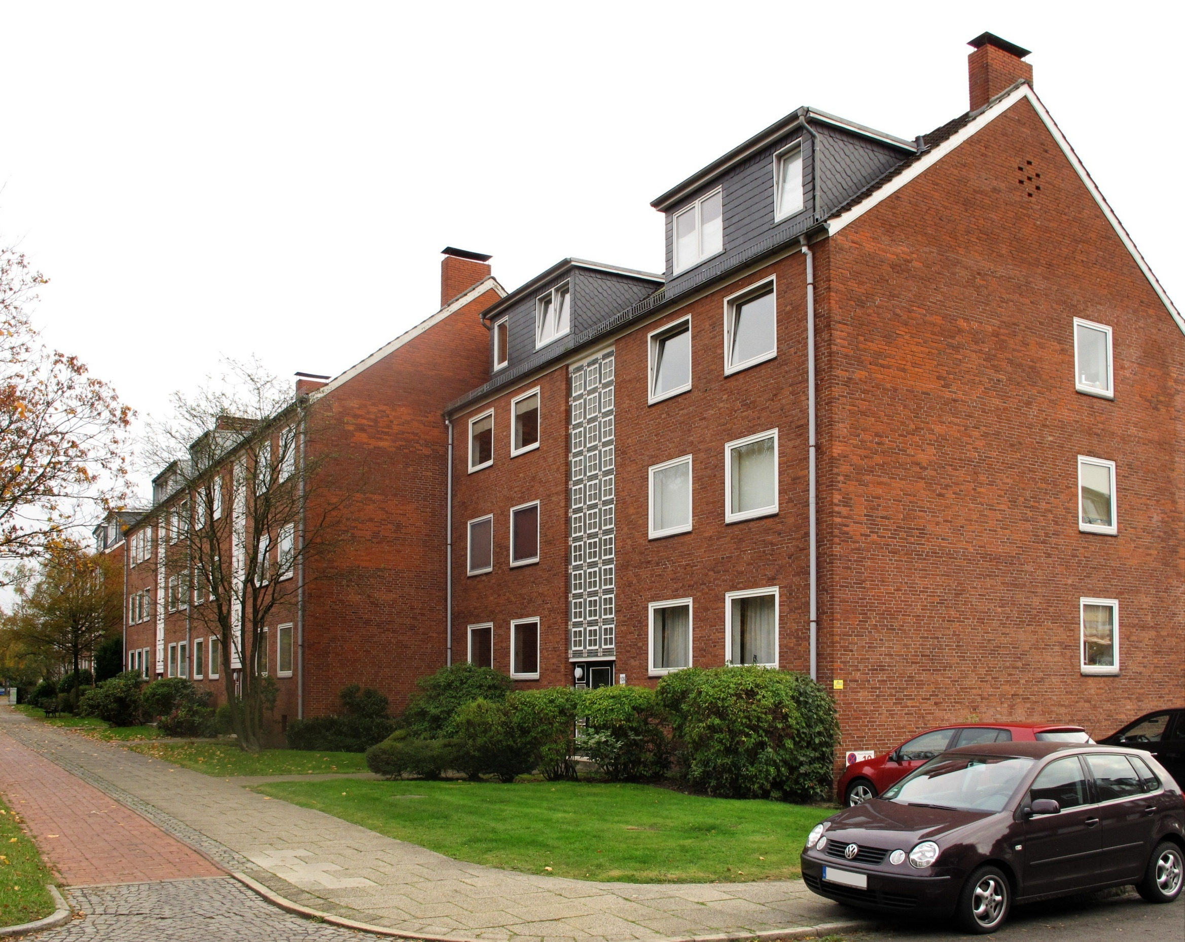 Wohnbauanlage Sparer-Dank (Anlage 1, Blick entlang Kulenkampffallee), Bremen im Oktober 2014; Stadtteil: Schwachhausen; Ortsteil: Neu-Schwachhausen; Baujahr: 1961-1966; Architekten: Gerhard Müller-Menckens, Friedrich Heuer und Gunter Müller (alle Bremen)